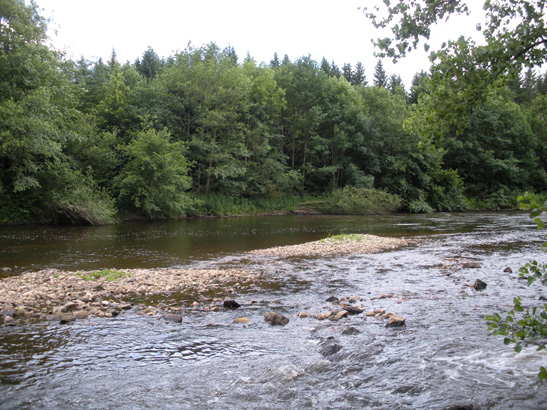 Rivière Dore en amont d'Olliergues 63